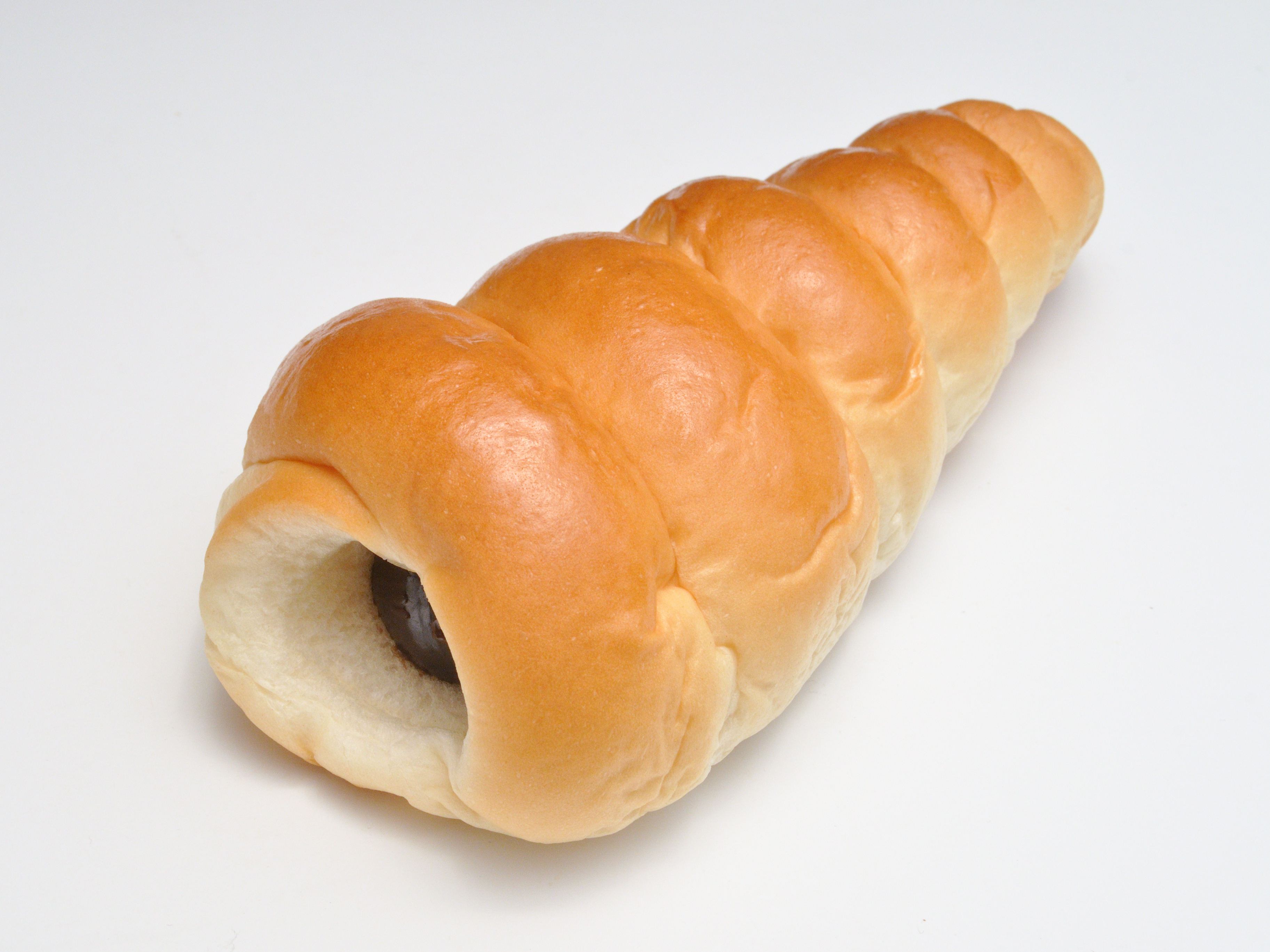 チョココロネ